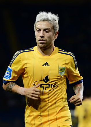 Металлист 3:1 Севастополь